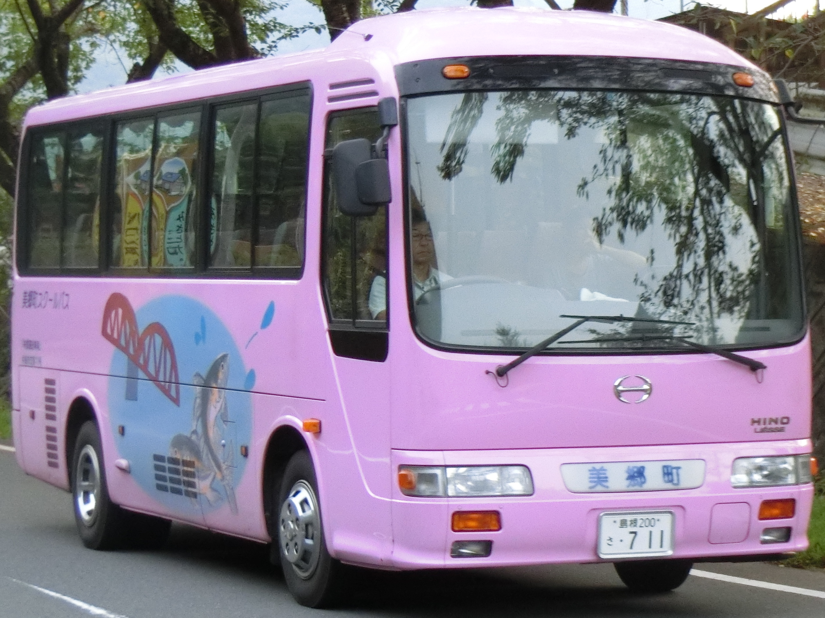 美郷町スクールバスに使用されるリエッセ。潮駅前で撮影。